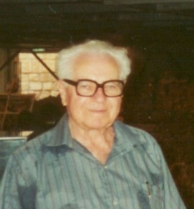 Josef Kornblum (1917-2009)